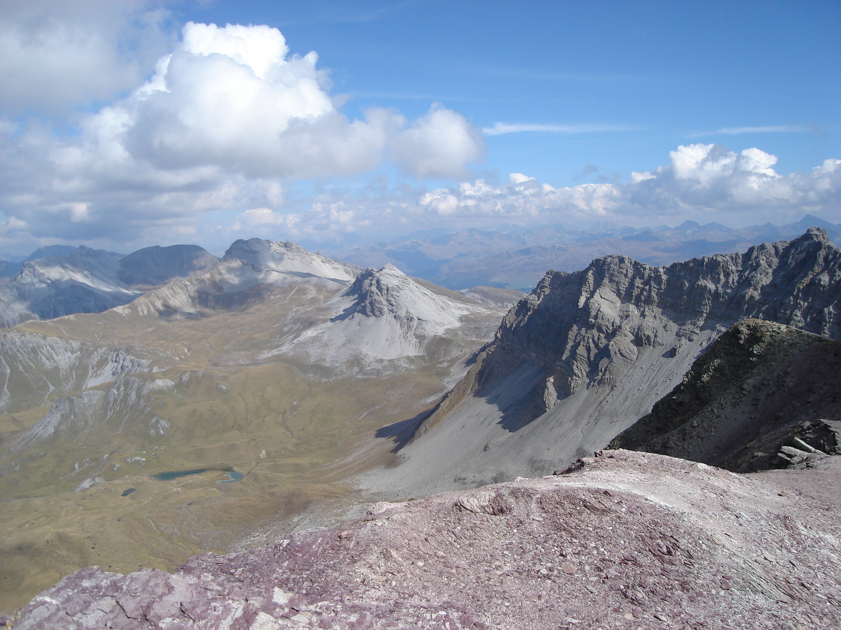 Aussicht vom Sandhubel